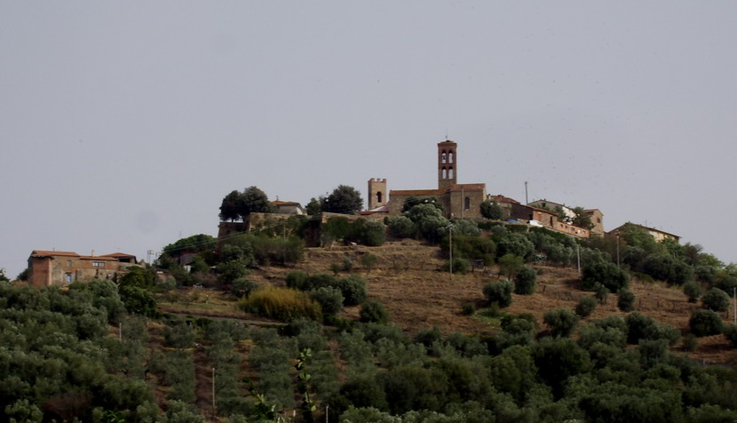 Panorama di Montepescali (GR)